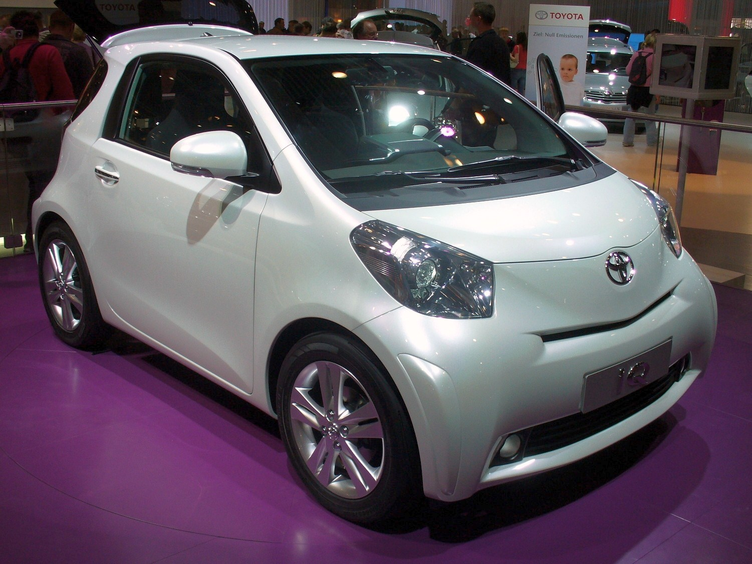 Toyota iQ